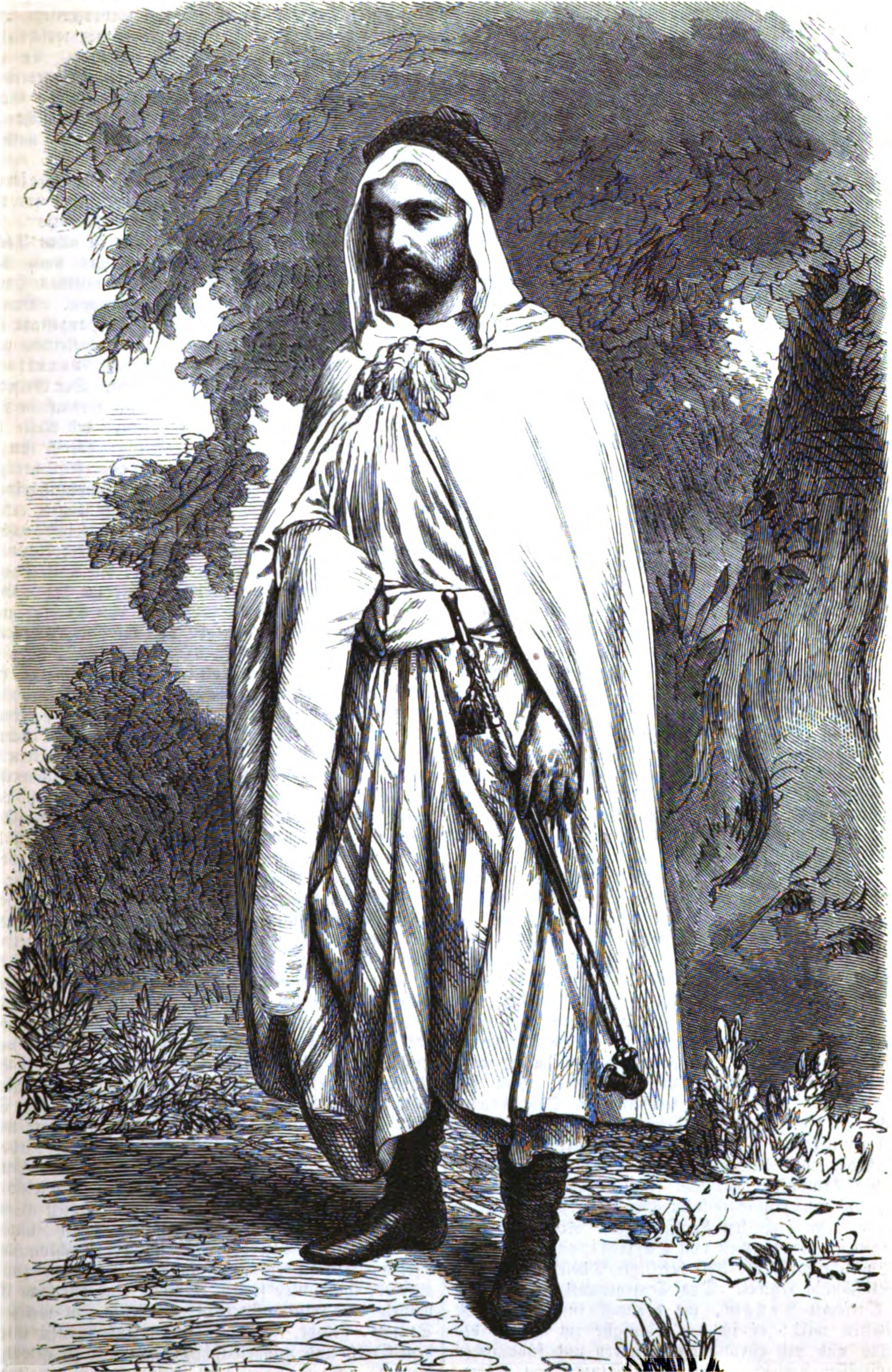 Gerhard Rohlfs, deutscher Afrika-Forscher im 19. Jh.